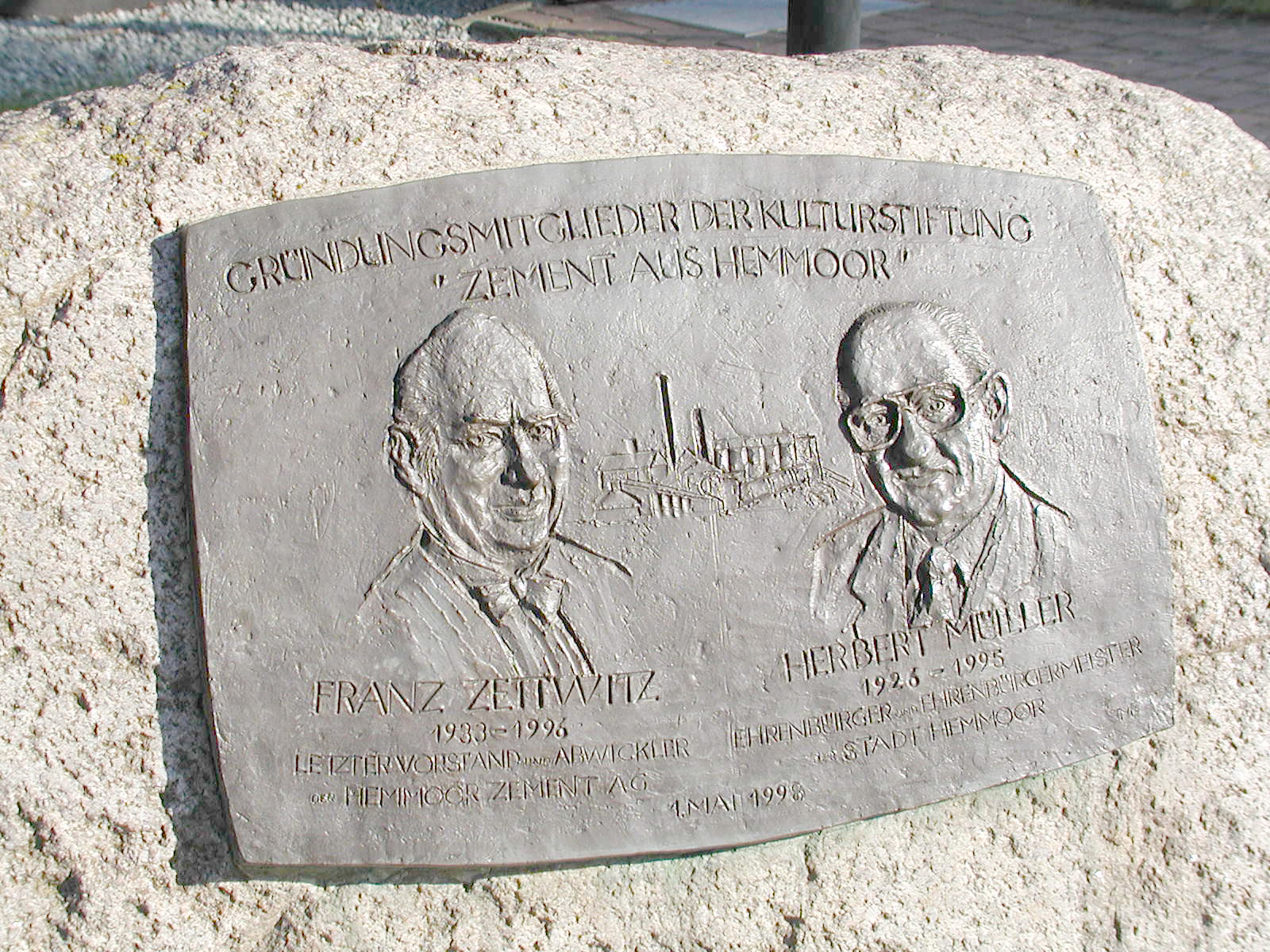 Die Gründungsmitglieder